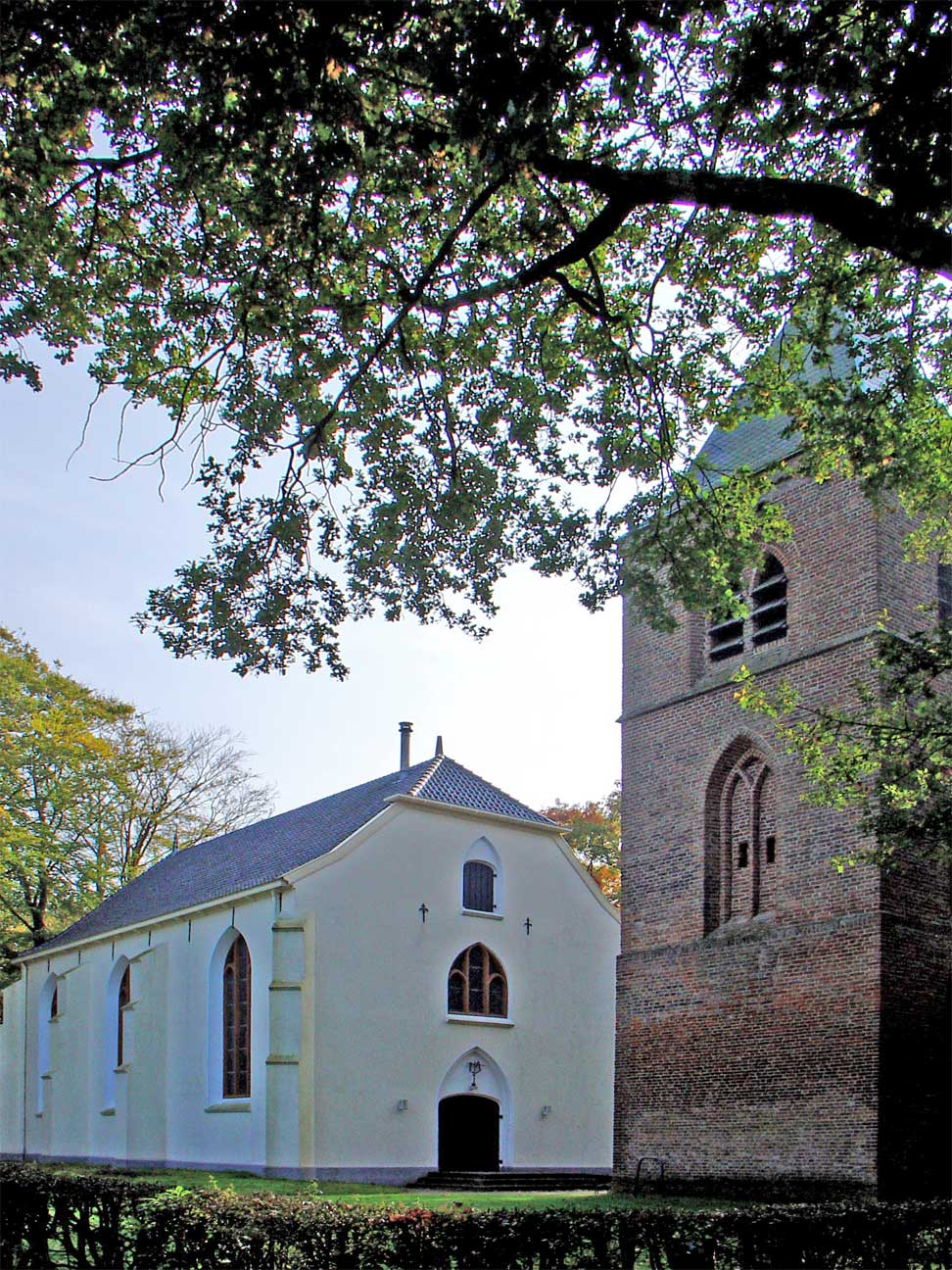 kerk van Oosterhesselen met gescheiden toren